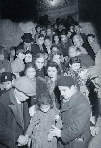 Rifugio anti-aereo Siracusa